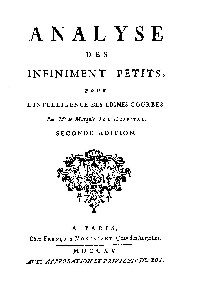 Analyse des infiniment petits, pour l'intelligence des lignes courbes. par Mr le Marquis De l'Hospital. - A Paris : chez François Montalant, Quay des Augustins …, 1715 (A Paris : de l'imprimerie de J. Quillau imp. iur. lib. de l'Univ.). - XV, [1], 181, [1] p., 11 c. di tav. : ill. ; 4° .